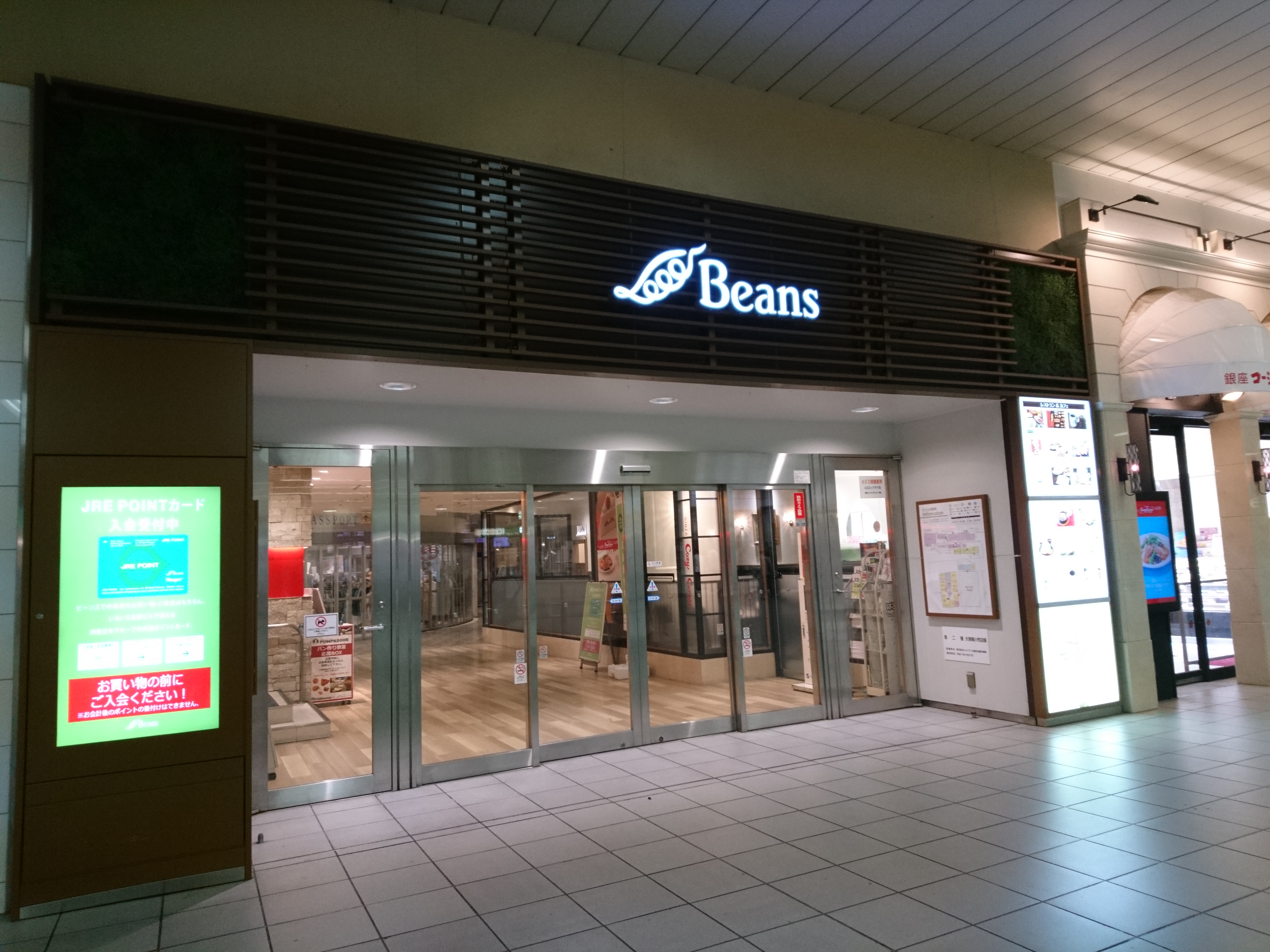 ビーンズ赤羽 2019年6月2日撮影